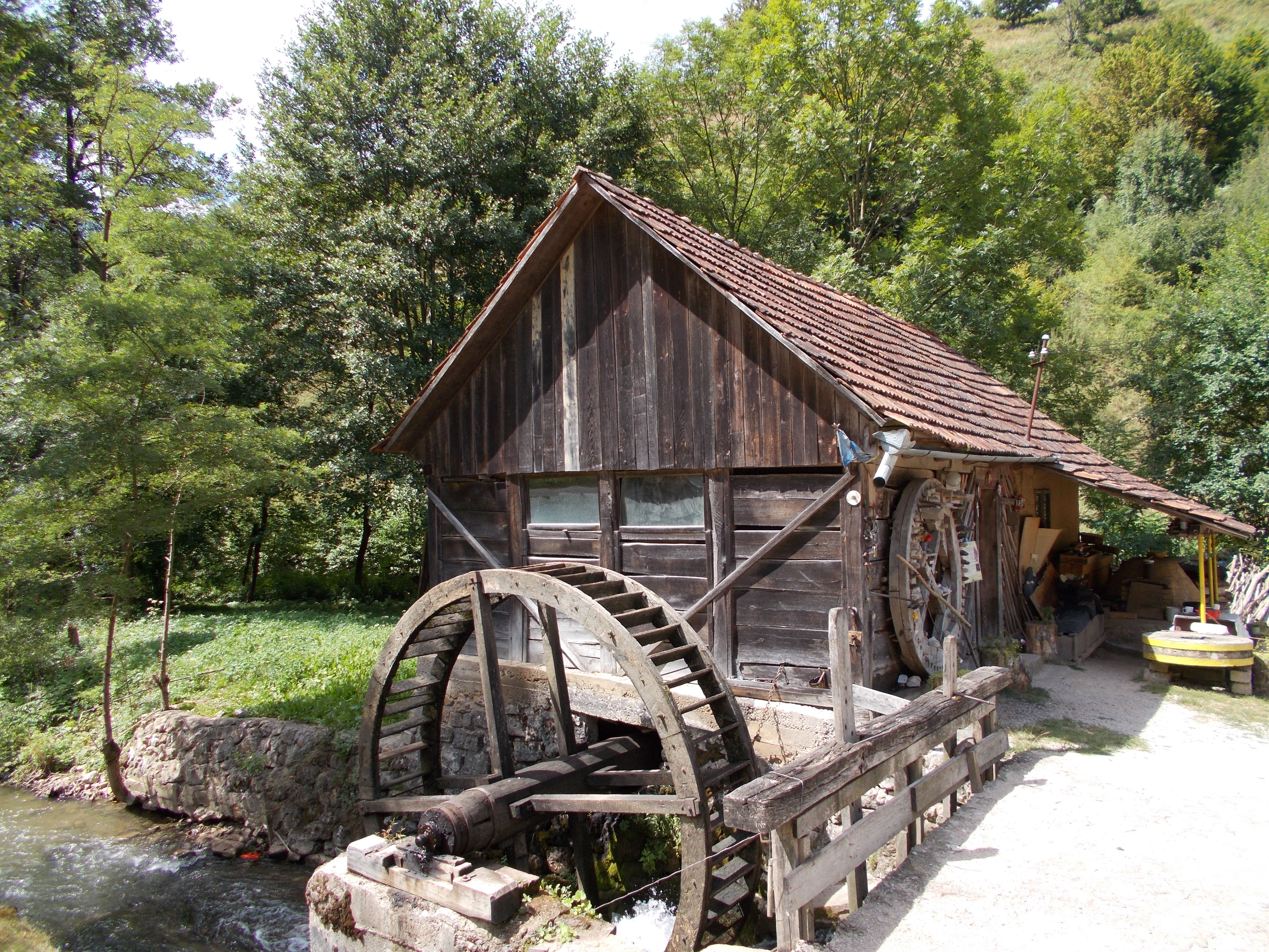 Moară de apă în satul Roșia, județul Bihor